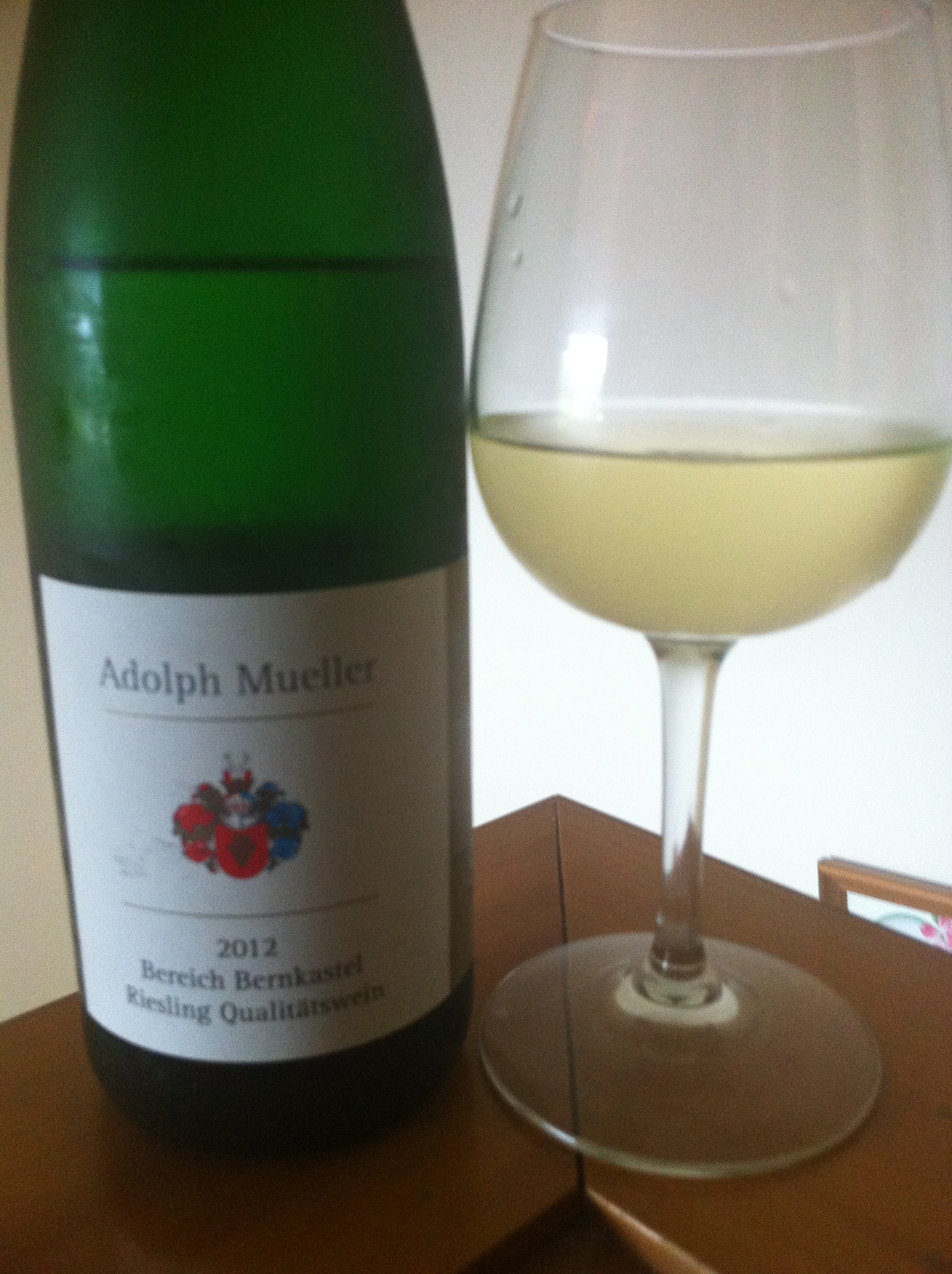 Deutscher Qualitatswein from the Mosel